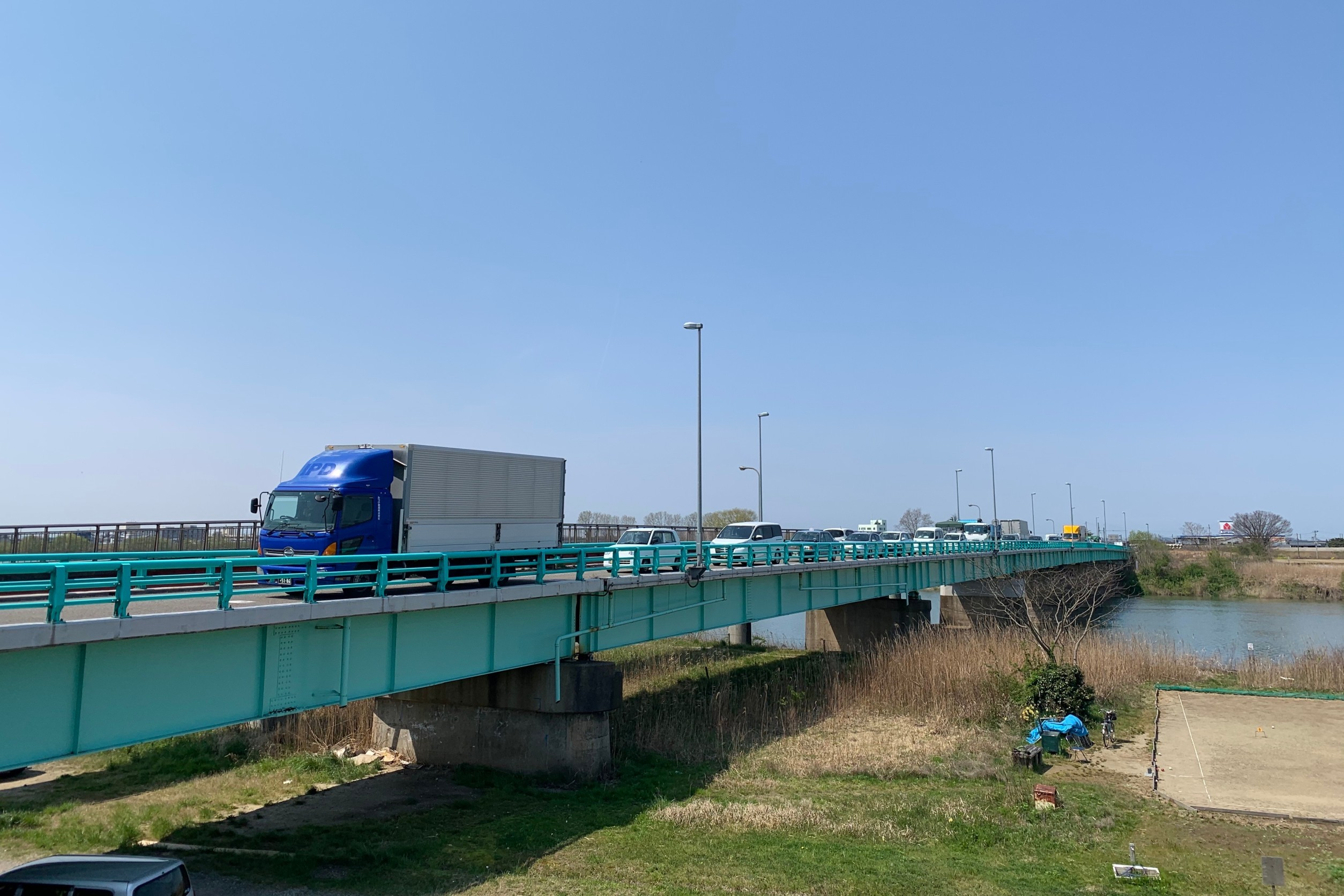 新潟県道1号新潟小須戸三条線・瑞雲橋（2020年4月）